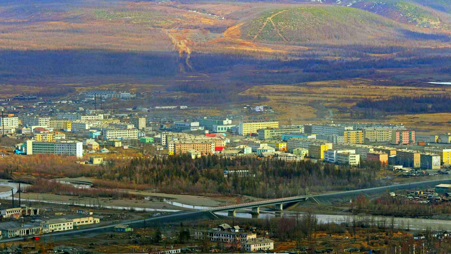 Центральная часть г. Сусумана